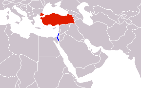 Locator